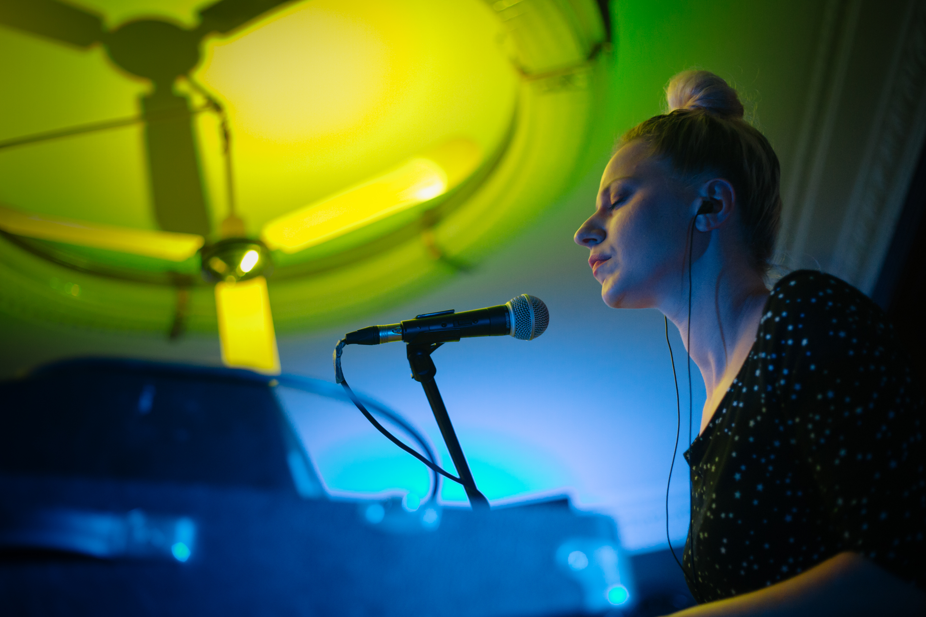 autor: Michał Murawski